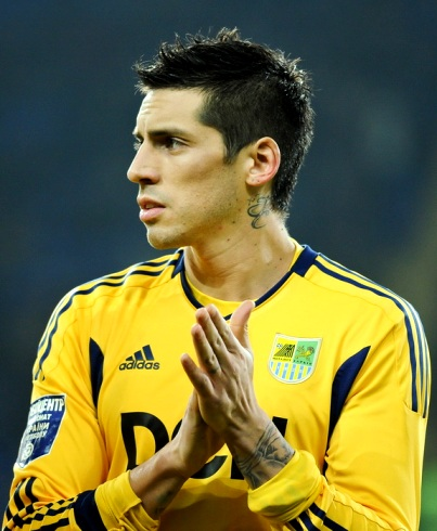 Перед матчем с ФК Волынь